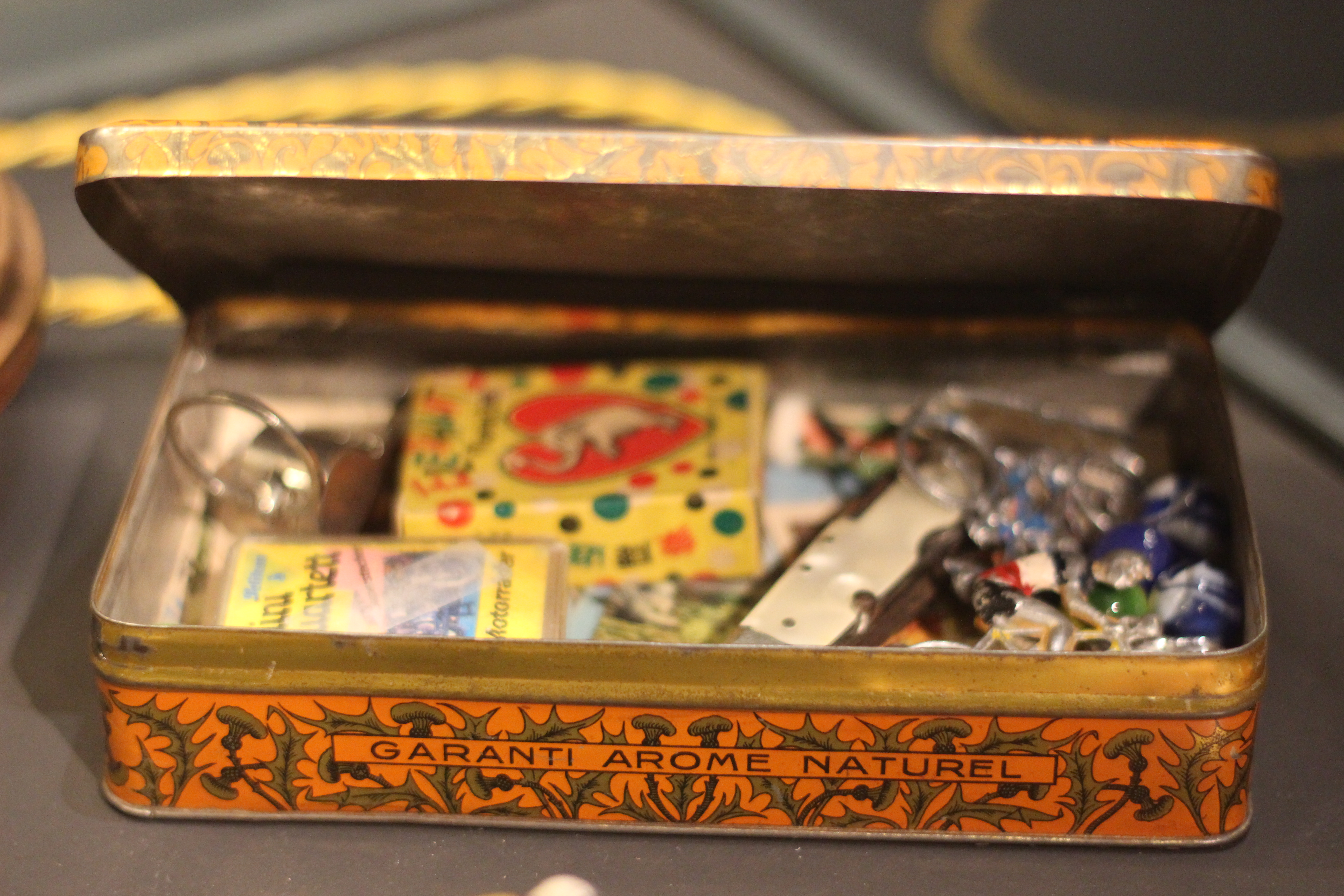 Souvenirs de Dominique Bretodeau dans le film Le Fabuleux Destin d'Amélie Poulain. Exposition "Caro/Jeunet" au musée Minature et Cinéma en 2018-2019.